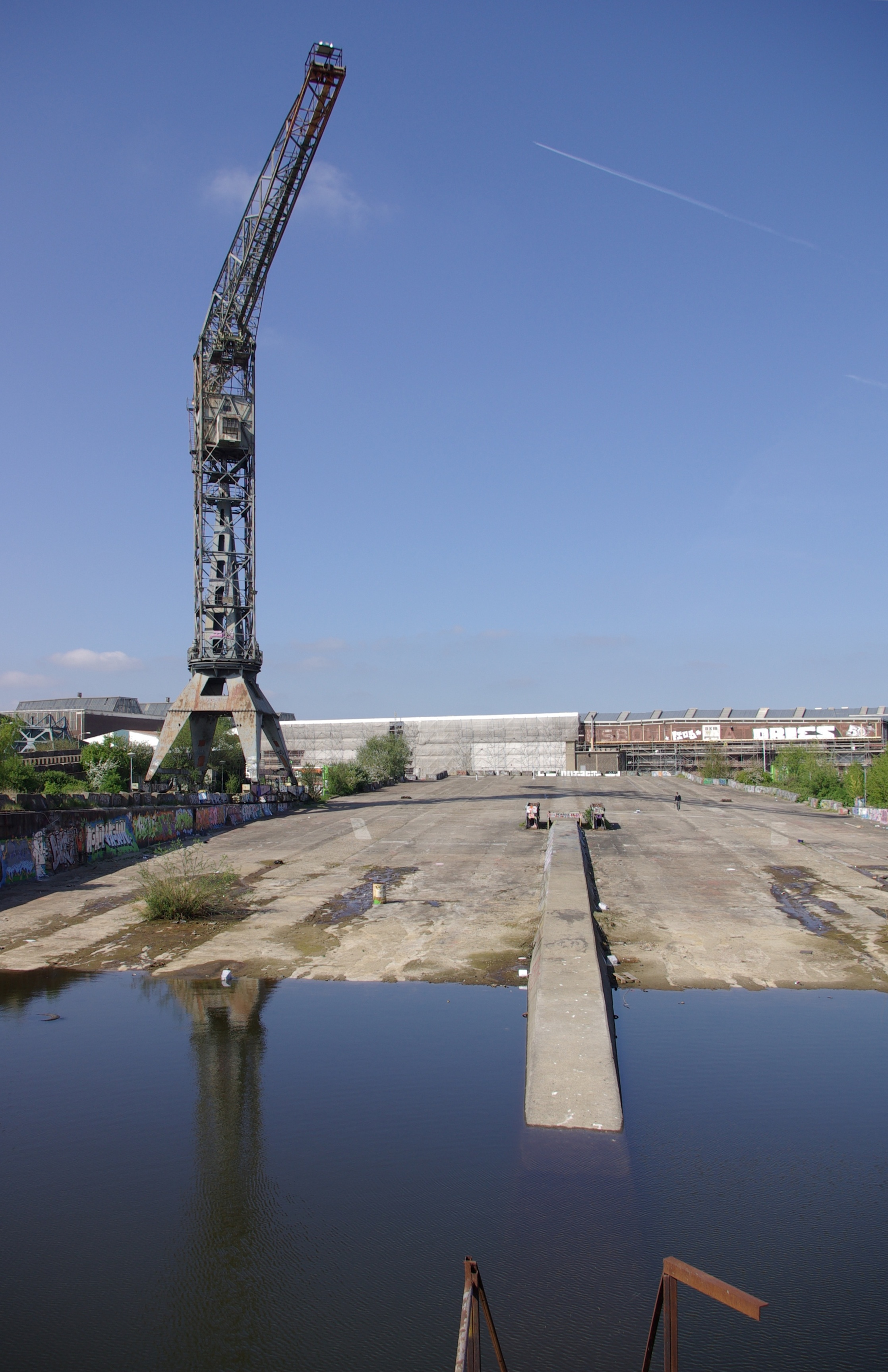 Kran und Dok der Werft NDSM im Amsterdamer Hafen